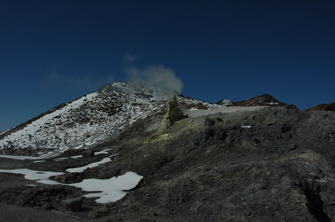 Tateyama Jigokudani fumarole(Toyama Pref. Japan) Ja:北アルプス・立山の地獄谷噴気孔(富山県立山町)